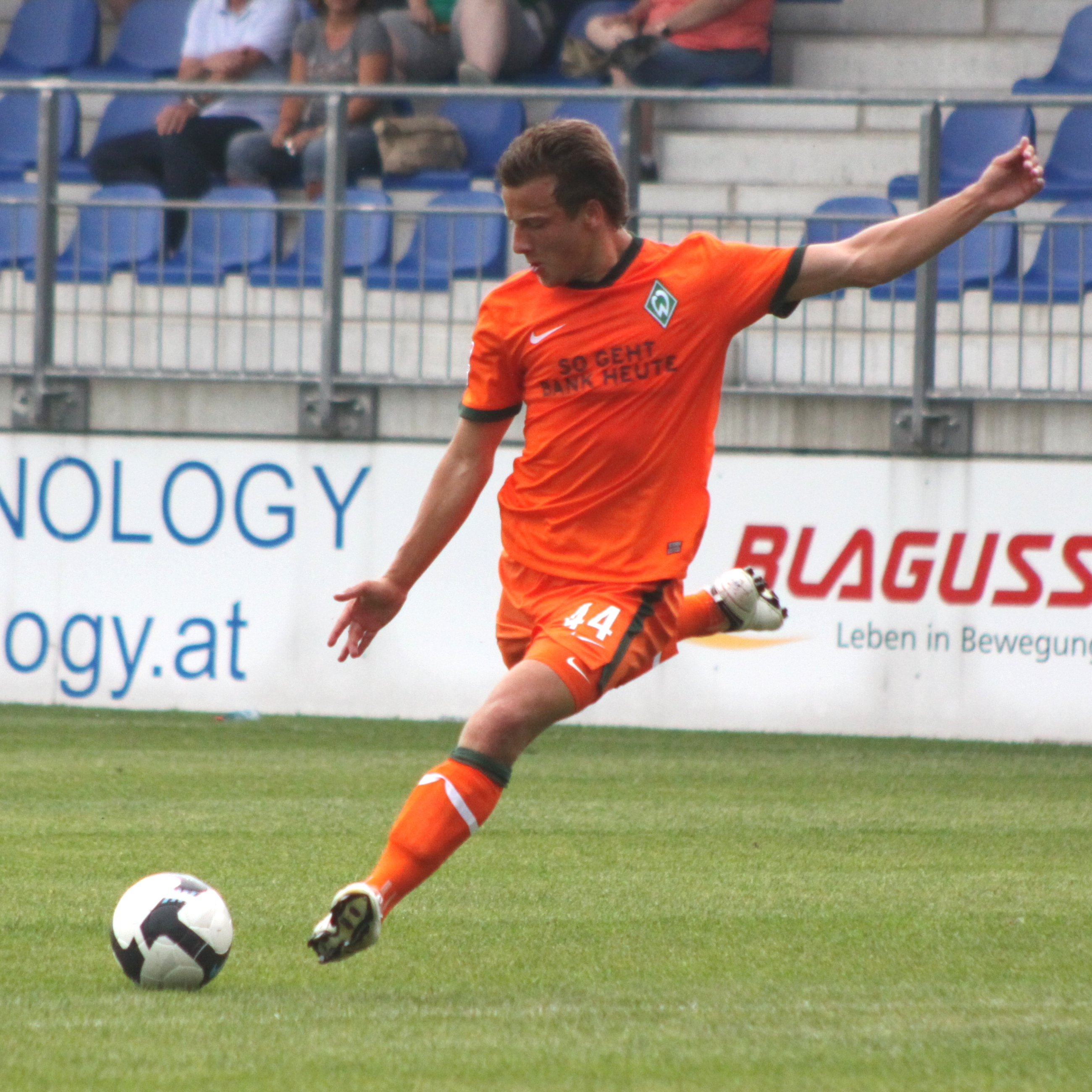 Philipp Bargfrede - SV Werder Bremen (3)